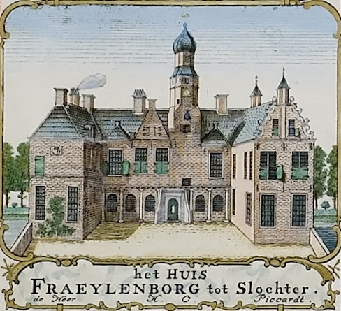 Fraeylemaborg in Slochteren. Uitsnede uit de kaart van Theodorus Beckeringh uit 1781